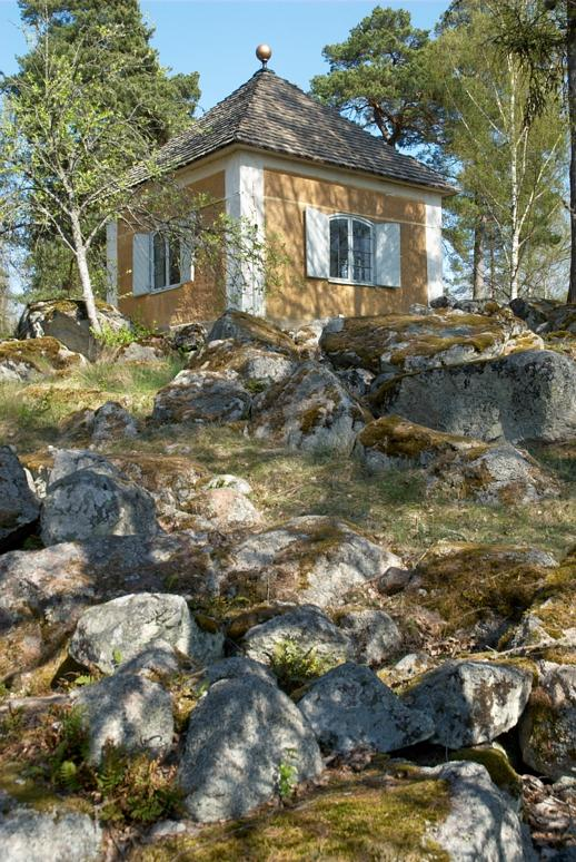 Högst upp i parken ligger MUSEET, uppfört 1769. "Mitt palats i himlen" kallade Linné den lilla stenbyggnaden. Där förvarade han sin naturaliesamling brand- och översvämningssäkert. Numera arkiv. Motiv: Linnés Hammarby Nyckelord: Byggnadsminnen:Statl, Kulturreservat, Riksintressen Kategori: Museum, Bostadshus Högst upp i parken ligger MUSEET, uppfört 1769. "Mitt palats i himlen" kallade Linné den lilla stenbyggnaden. Där förvarade han sin naturaliesamling brand- och översvämningssäkert. Numera arkiv.